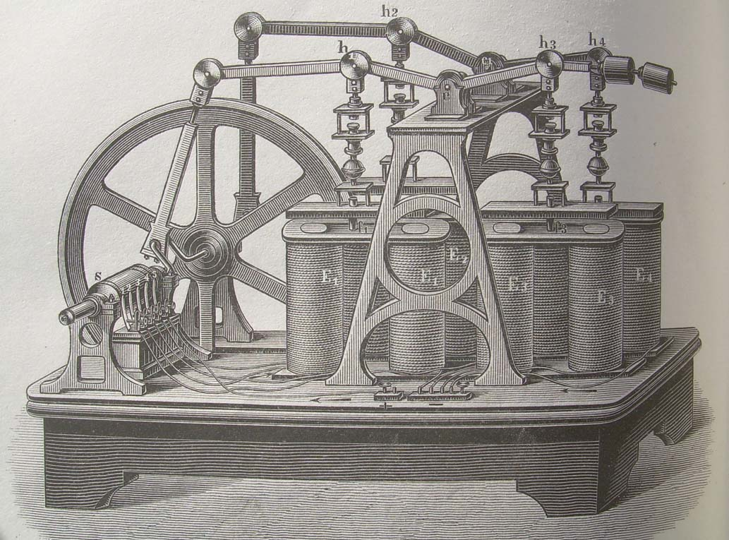 Elektromotor nach Egger.Als besonders günstig bezüglich des Nutzeffectes hat sich nach den Messungen von R.Handmann die Construction des von Martin Egger in Mariaschein erfundenen Motors, welcher in Fig 453 abgebildet ist, herausgestellt. Derselbe besteht aus 4 Hufeisenelektromagneten E1, E2, E3, E4 welche in Rechteckform, wie aus der Figur ersichtlich ist, mit den Polen nach aufwärts auf einer Grundlplatte befestigt sind. Die zugehörigen Anker aus weichem Eisen sidn mittelst freibeweglicher Gehänge an den Punkten h1, h2, h3 h4 der beiden um die Axen c1,c1 drehbaren Hebel angehängt und ausserdem mit Führungen f1, f2, f3, f4 versehen. Mittelst Pleuel- und Kurbelstangen stehen diese beiden Hebel mit der Schwungradwelle des Motors in Verbindung, auf welcher auch die Stromsteuerung s angebracht ist. Letztere besteht aus einer Walze, gegen welche 5 Metallfedern angedrückt sind, so dass sie neben einander über die Oberfläche derselben schleifen.